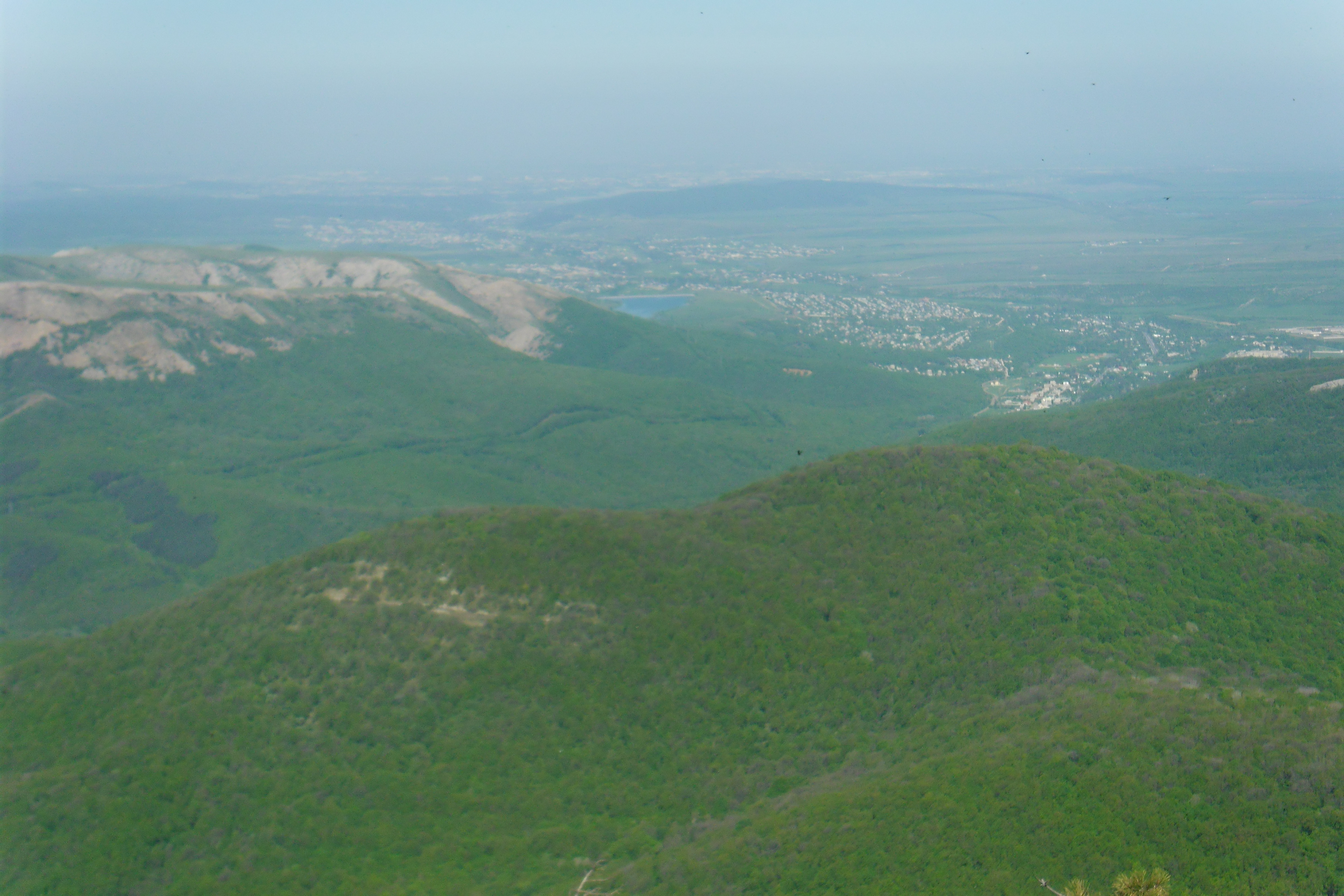 Фото